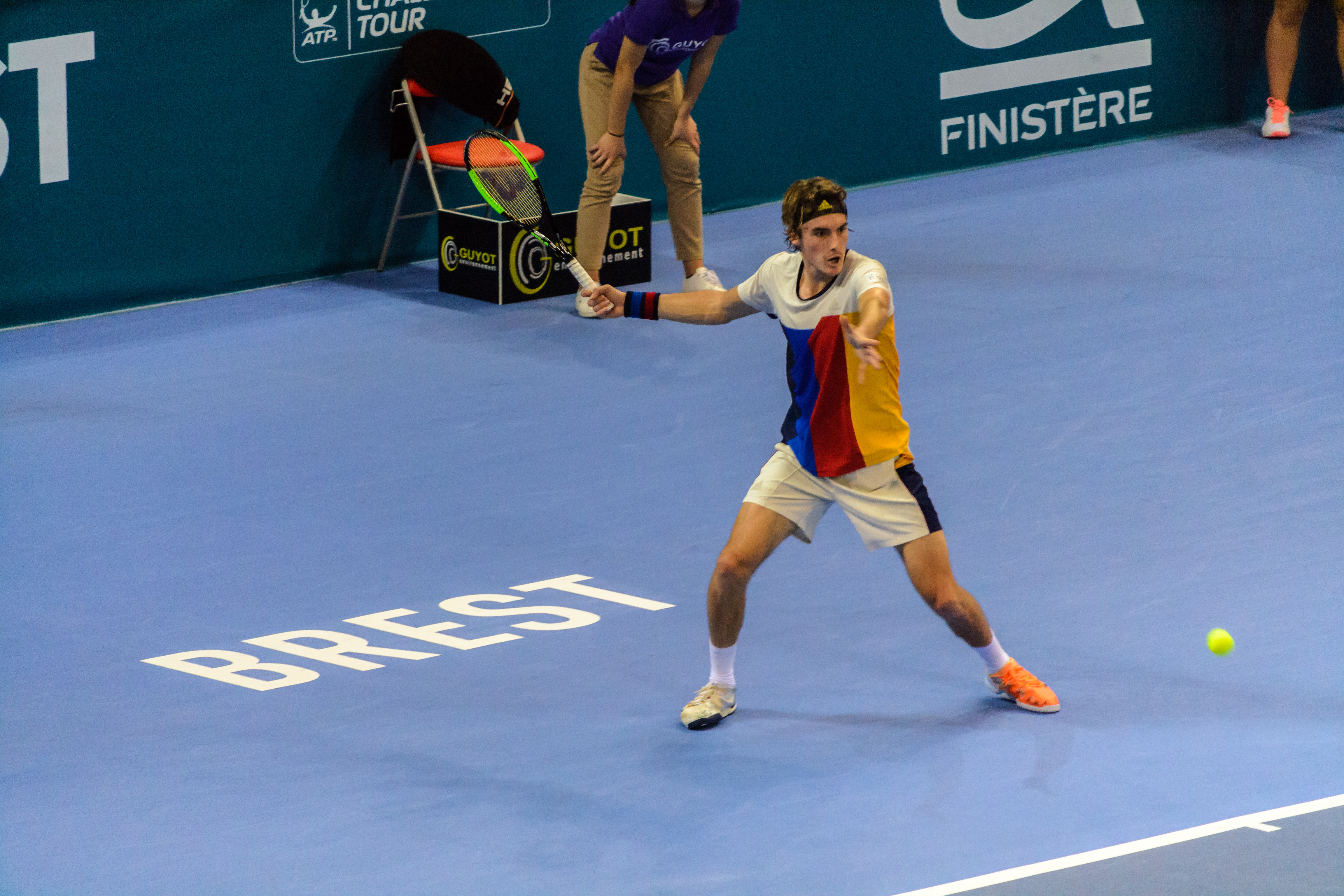 Rencontre entre le Français Corentin Moutet et le Grec Stefanos Tsitsipas en finale de l'Open Brest Arena le 29 octobre 2017. Corentin Moutet a remporté le tournois en deux sets, 6/2 7/6 [8] devant 3 500 spectateurs.